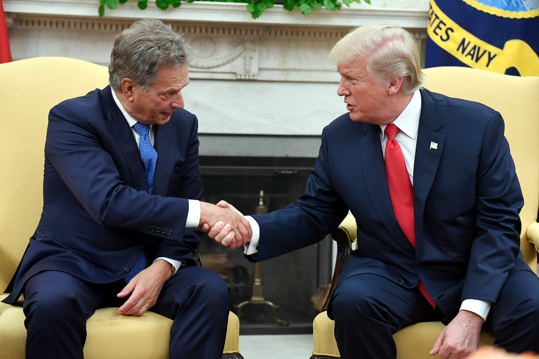 Presidentti Niinistö ja presidentti Trump kättelevät Valkoisen talon Oval Officessa. Antti Aimo-Koivisto / Lehtikuva